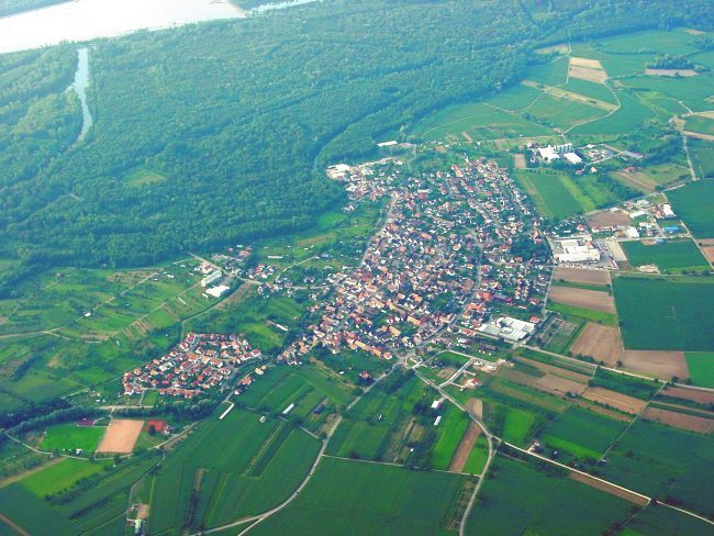 Luftbild von Weisweil aufgenommen bei einer Ballonfahrt mit dem Ballonteam Norbert Blau.